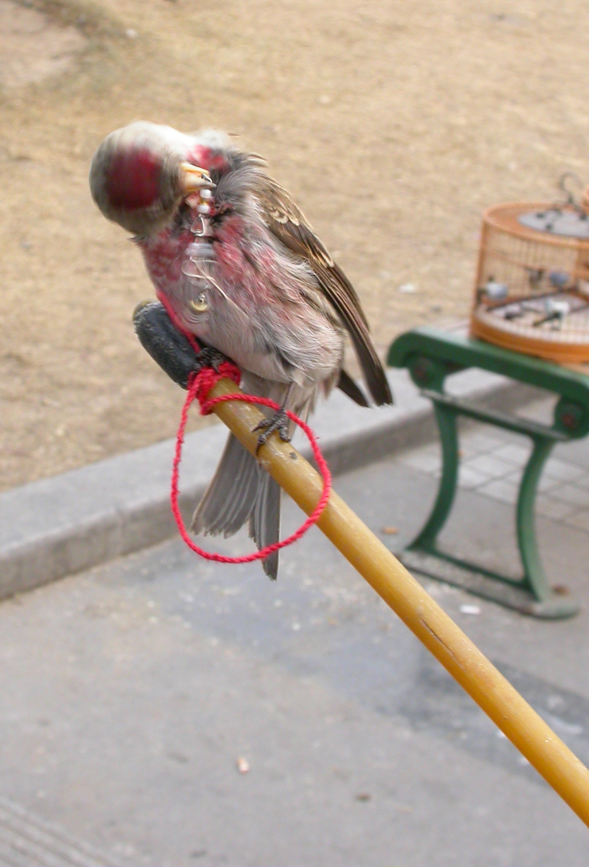 白腰朱顶雀，摄于北京官园鸟市，自己拍，本图片不允许百度百科使用